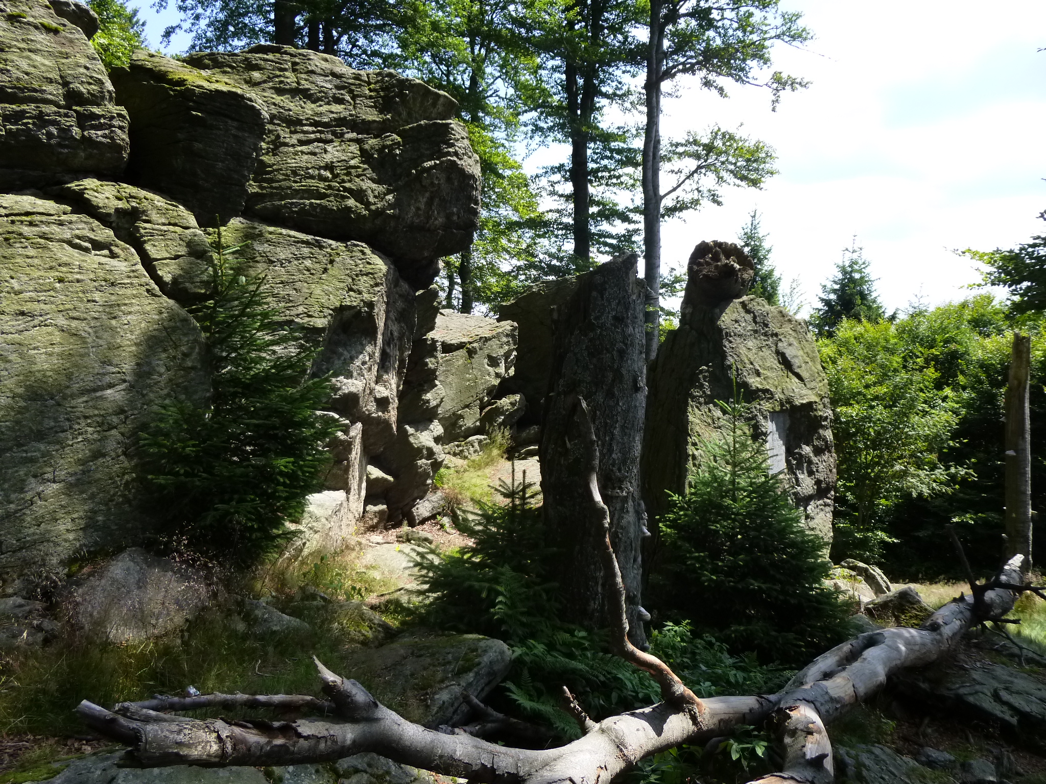 Felsblöcke auf dem Hirschenstein-Gipfel, 1095 m; Landkreis Straubing-Bogen, Niederbayern